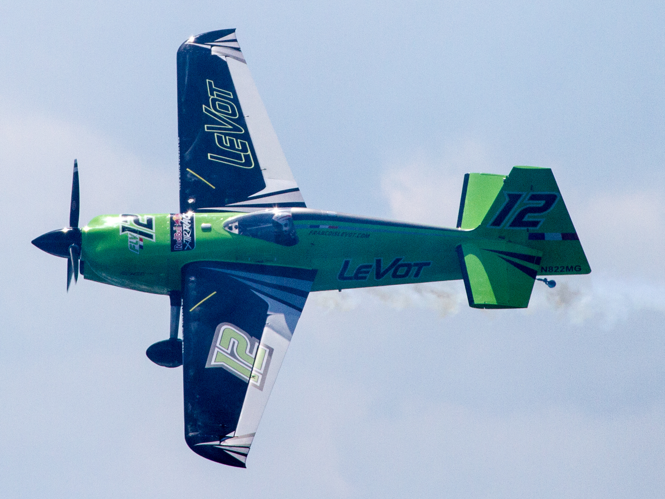 2017年レッドブル・エアレース・ワールドシリーズ 千葉 フランソワ・ルボット(フランス)の機体 - N822MG